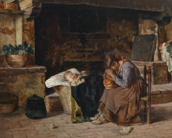 Il piccolo piagnucolone, olio su tela, 35 x 42 cm, coll. privata